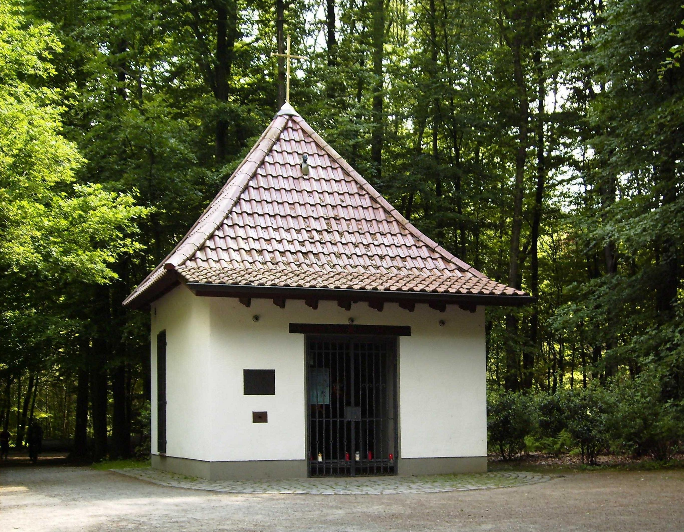 Sieben-Schmerzen-Kapelle in der Löchterheide (Westerholter Wald) in Gelsenkirchen-Buer an der Stadtgrenze nach Herten-Westerholt. 1723 von Henrika Johanna Christine Mathild von Aschenbroich zu Schonebeck als Sühnekapelle errichtet. Seither von den Mitgliedern der katholischen Pfarrgemeinden in Buer und Westerholt als Gottesdienst- und Andachtsstätte genutzt und erhalten.